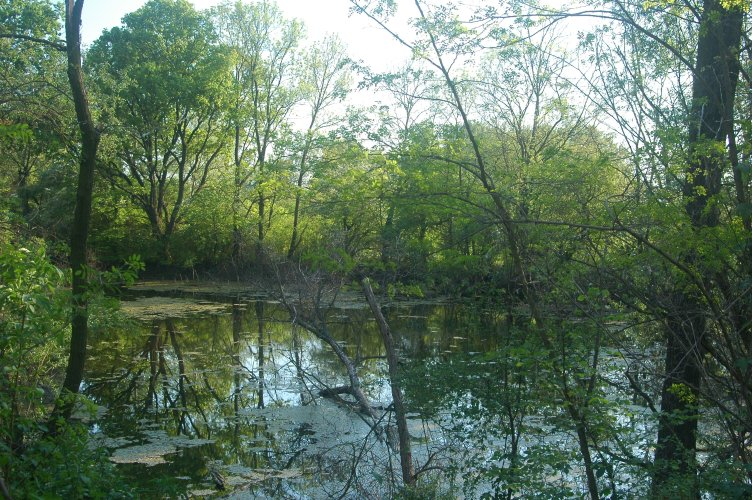 Morava, small pond in alluvial plain. Prievozský les, CHKO Záhorie, Lokalita: SKUEV0311, Kačenky